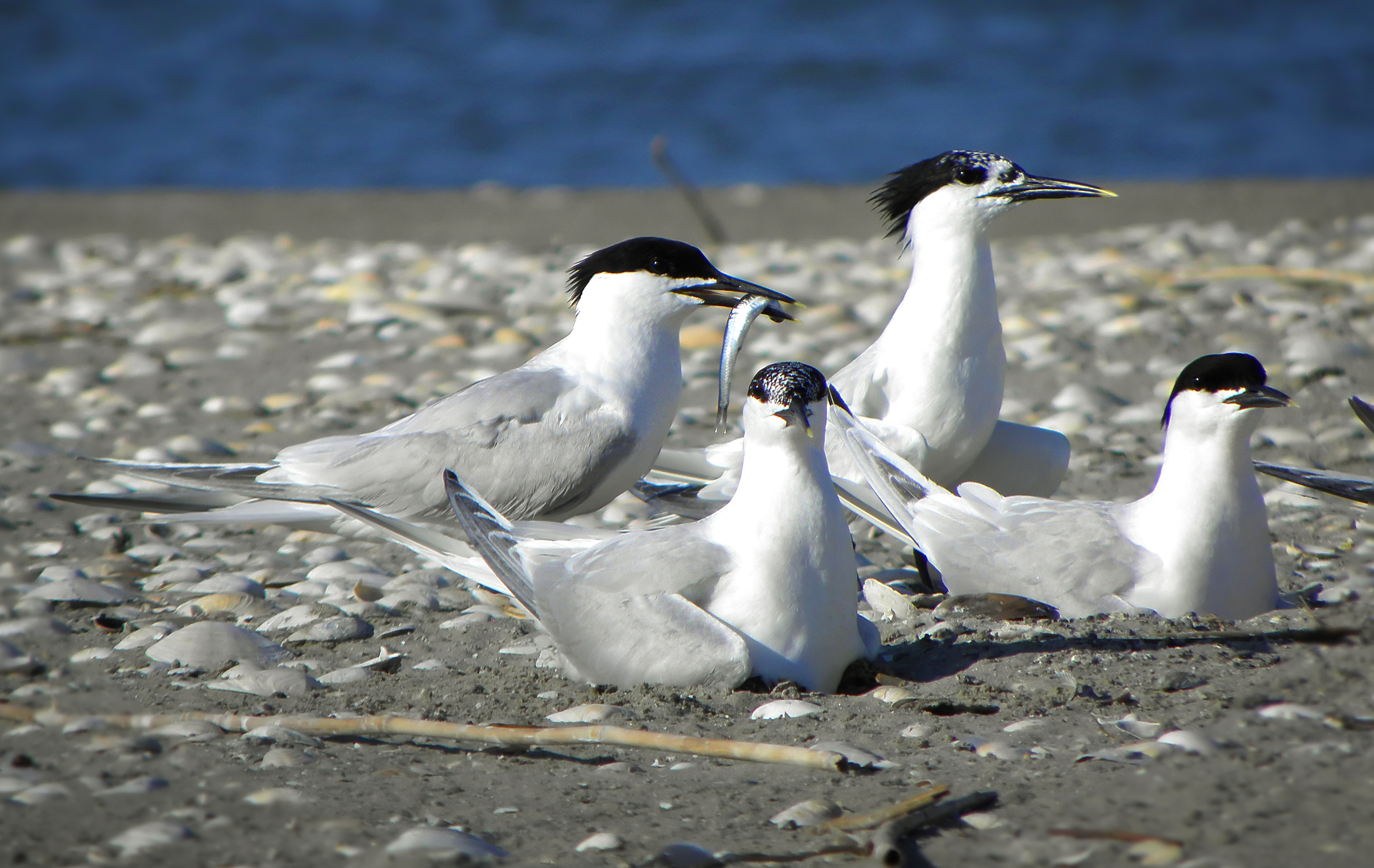 «Тузловські лимани», Татарбунарський район